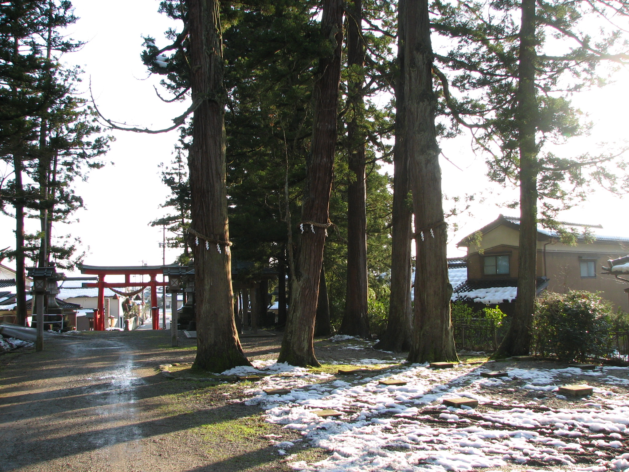 Futagami-imizu-jinja, Takaoka, Toyama, Japan 二上射水神社（富山県高岡市）境内 三本杉